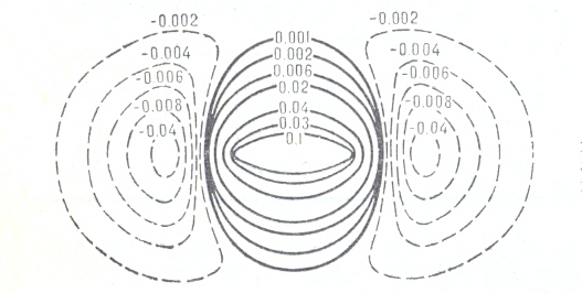 Контурная карта разностей электронной плотности для молекулы водорода